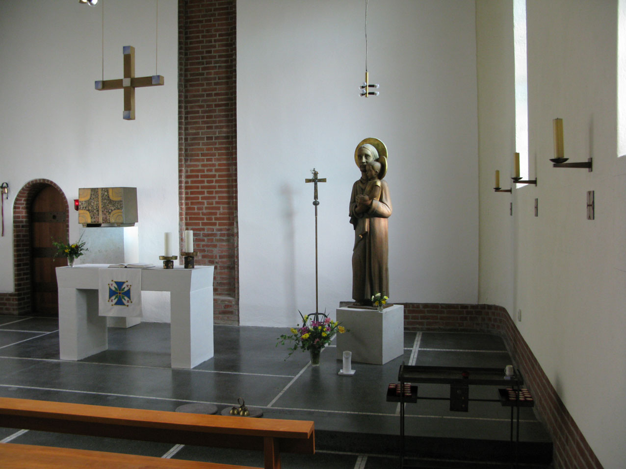 Innenraum der St.Josephskirche in Lindow (Mark) mit Josephsfigur